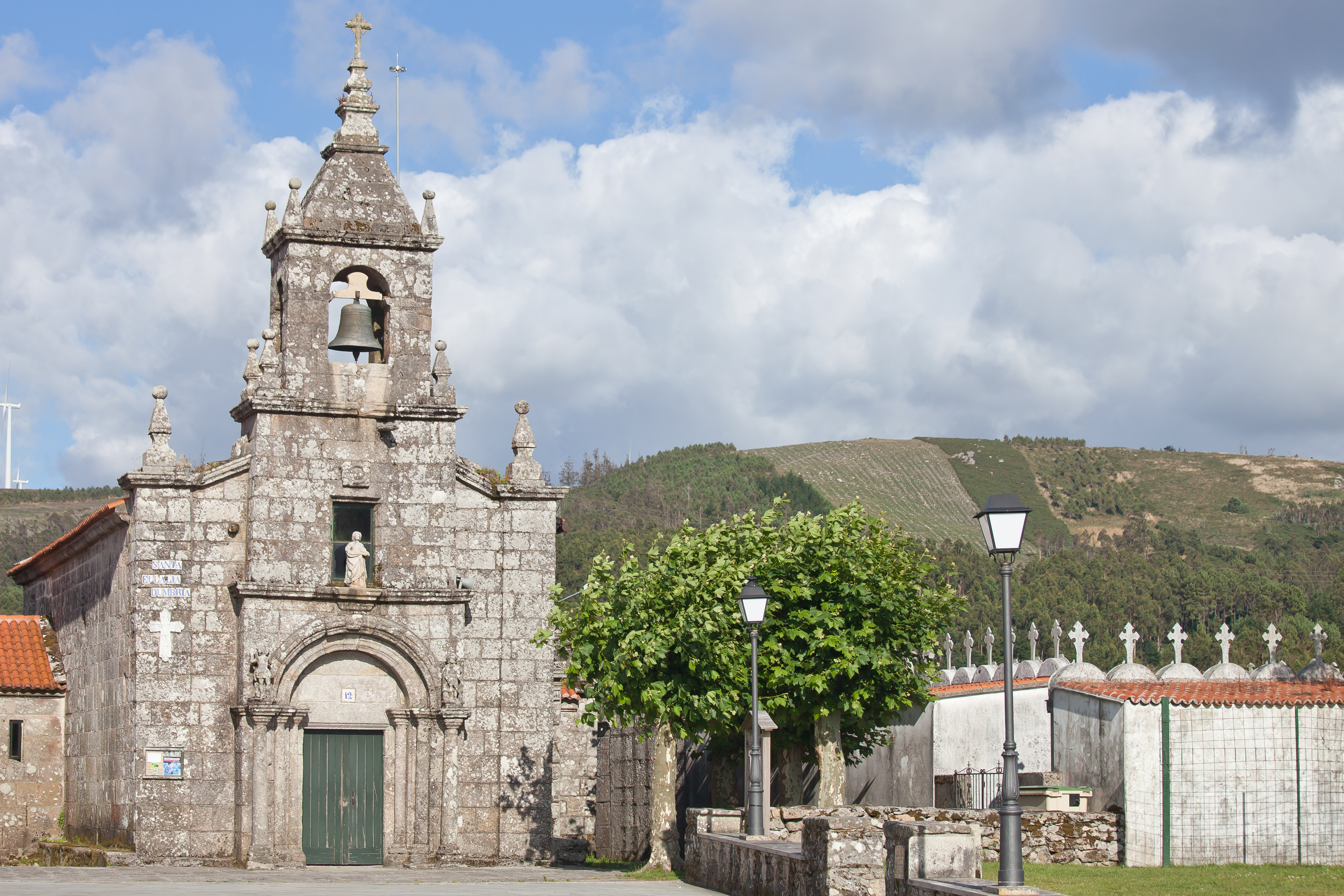 Igrexa de Santa Baia de Dumbría, Galiza